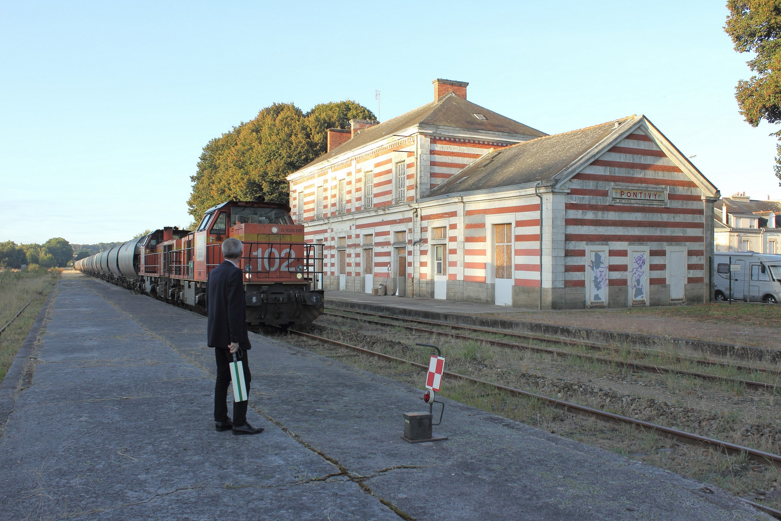 Départ d'un train de Fret vers Saint-Gérand (56)